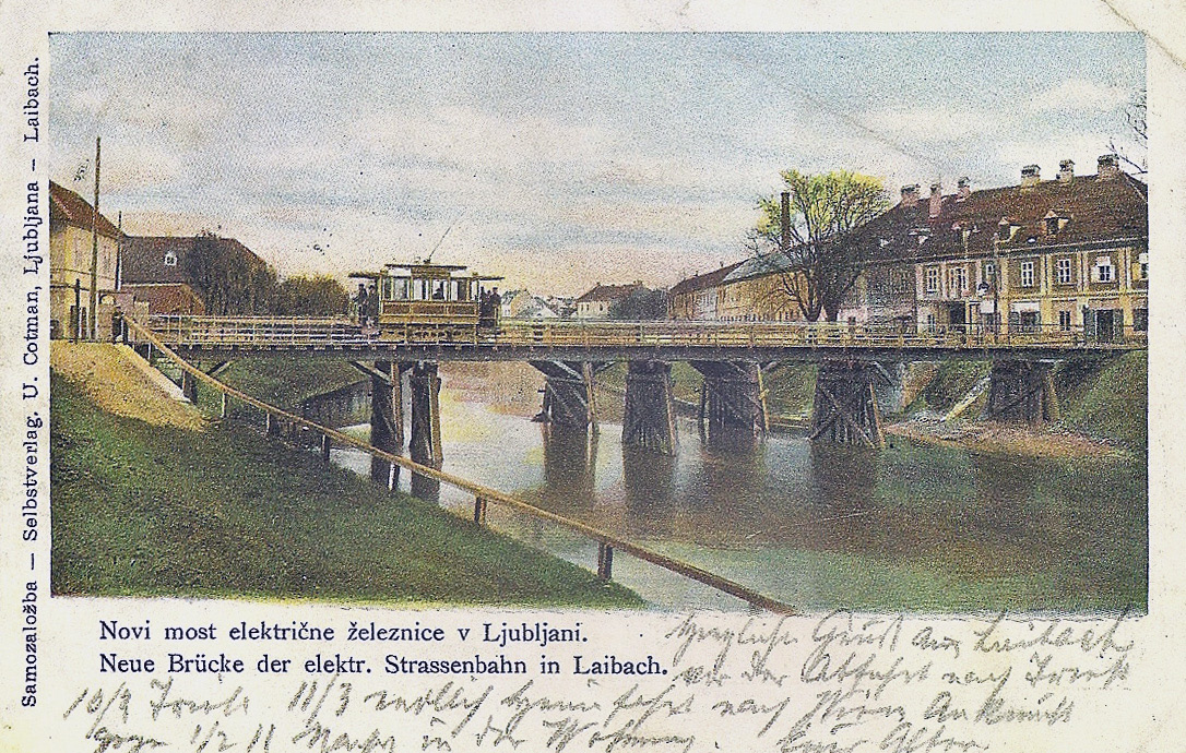 Razglednica šentpetrskega mostu.